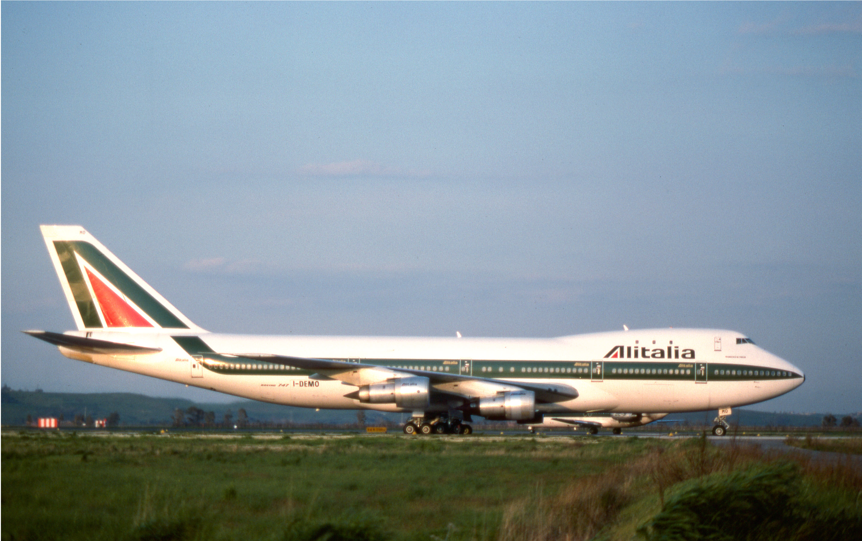 Alitalia 747